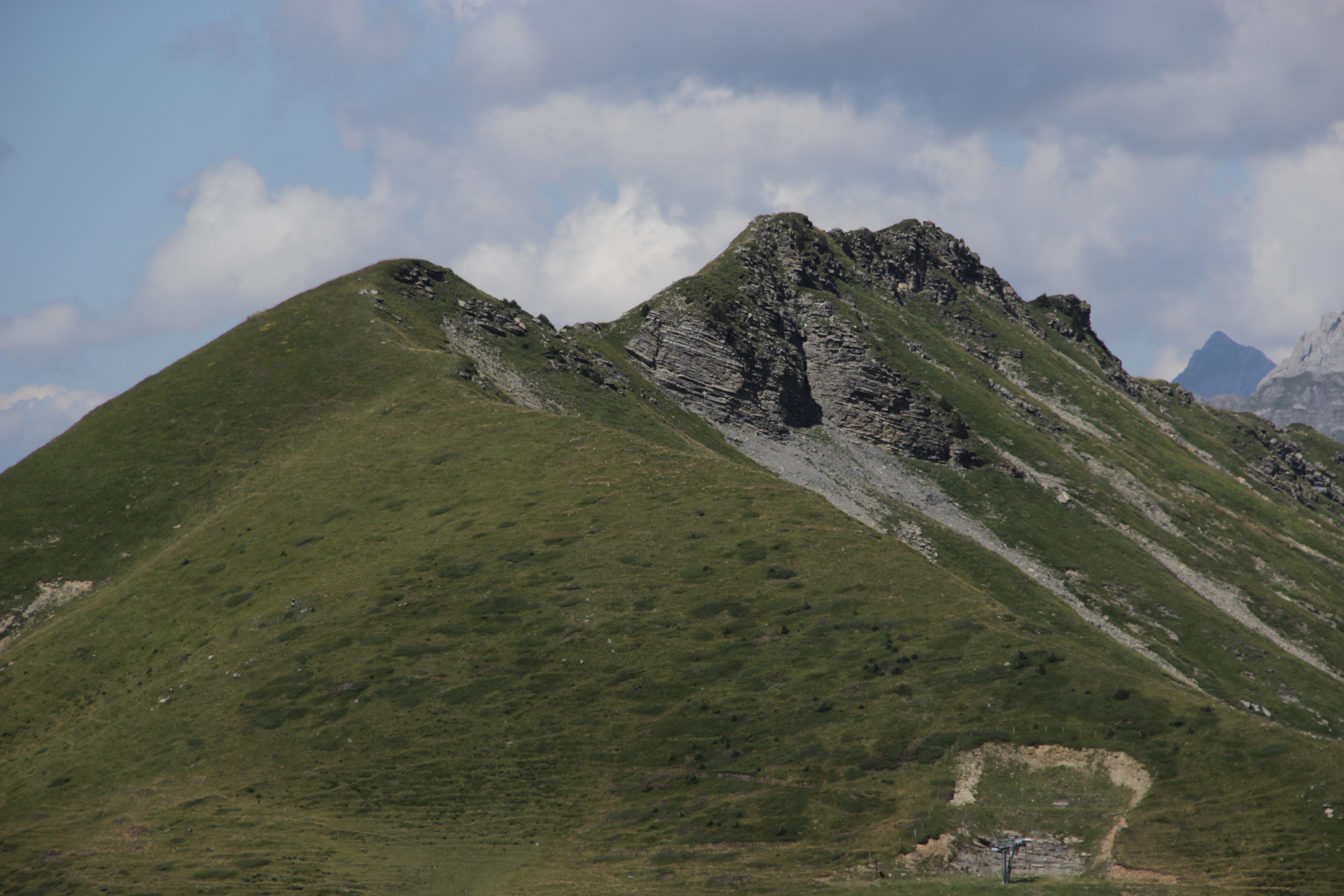 Floriette (2199 m) and Arnenhorn (2211 m) seen from La Palette (2170 m) above Les Diablerets (village)